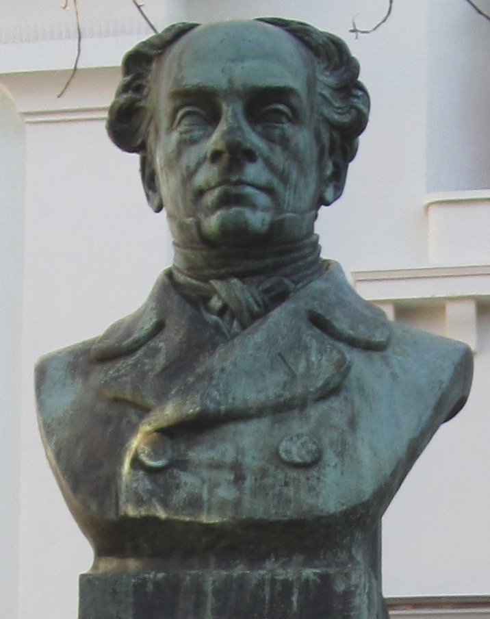 Büste Alban Stolz, Ecke Schoferstraße-Herrenstraße